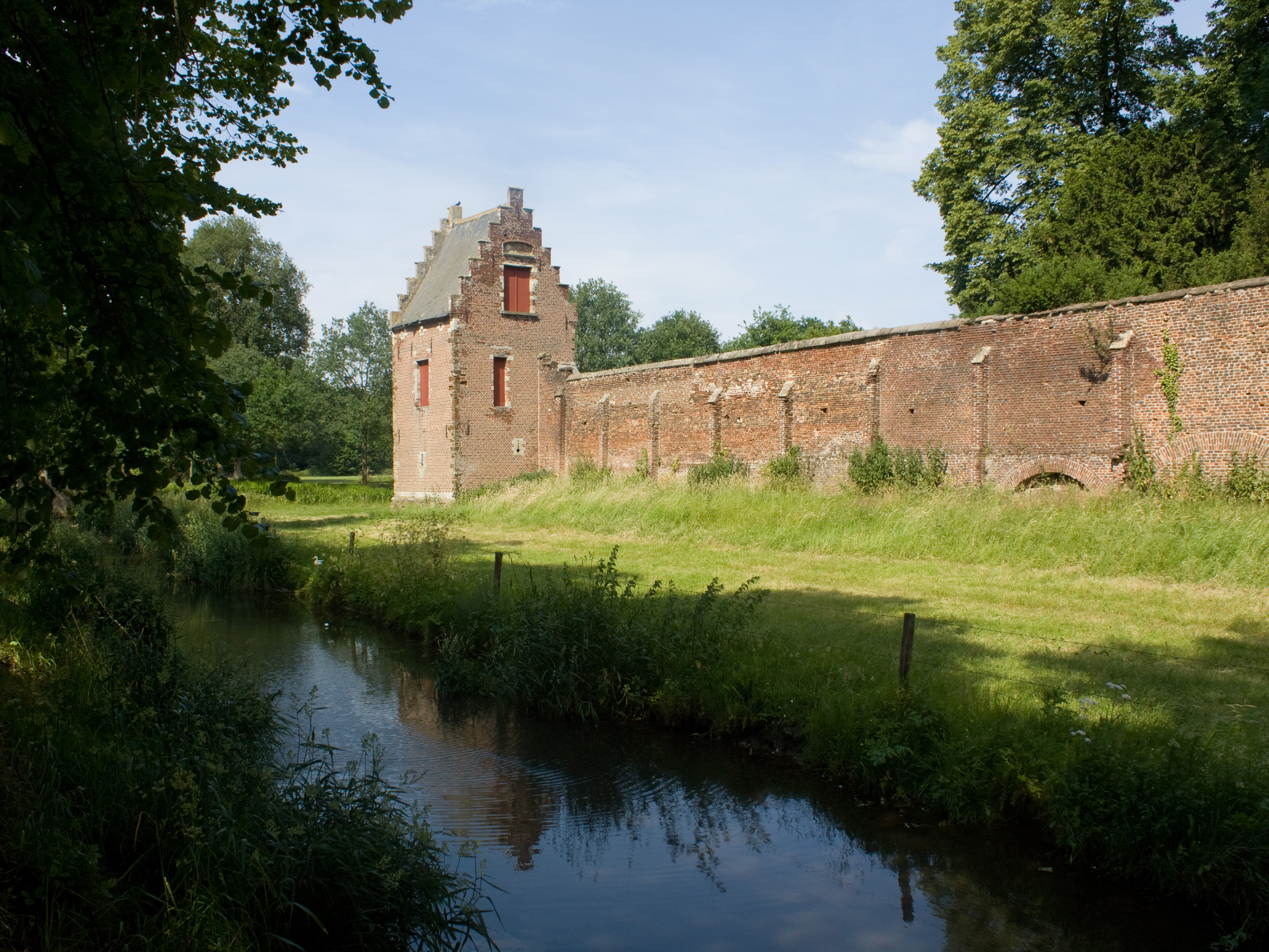 Afscheidingsmuur, Abdij van Tongerlo